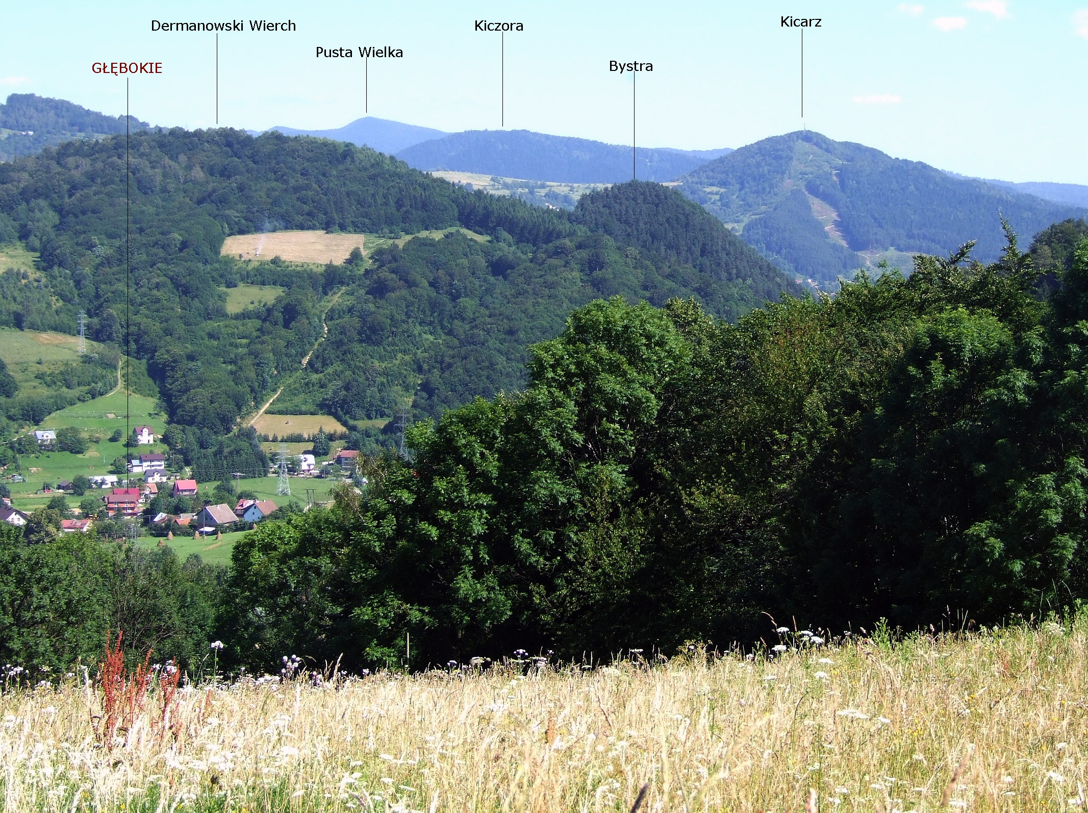 Widok ze stoków Młodowa